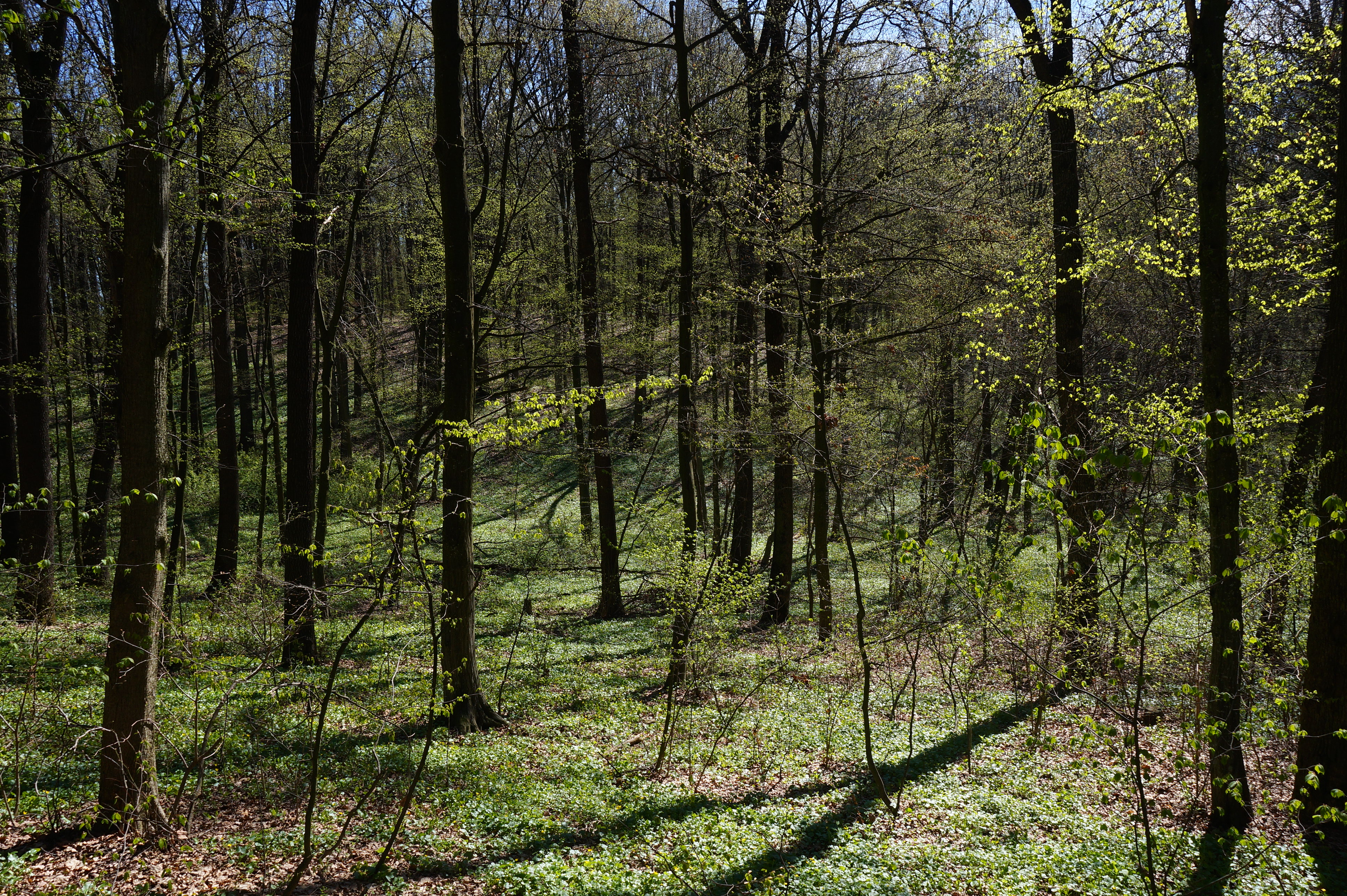 Володимирська Дубина (Володимирівська дубина), Жмеринський р-н, Гніванське л-во, кв. 32-35